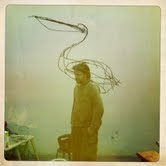 sculpteur